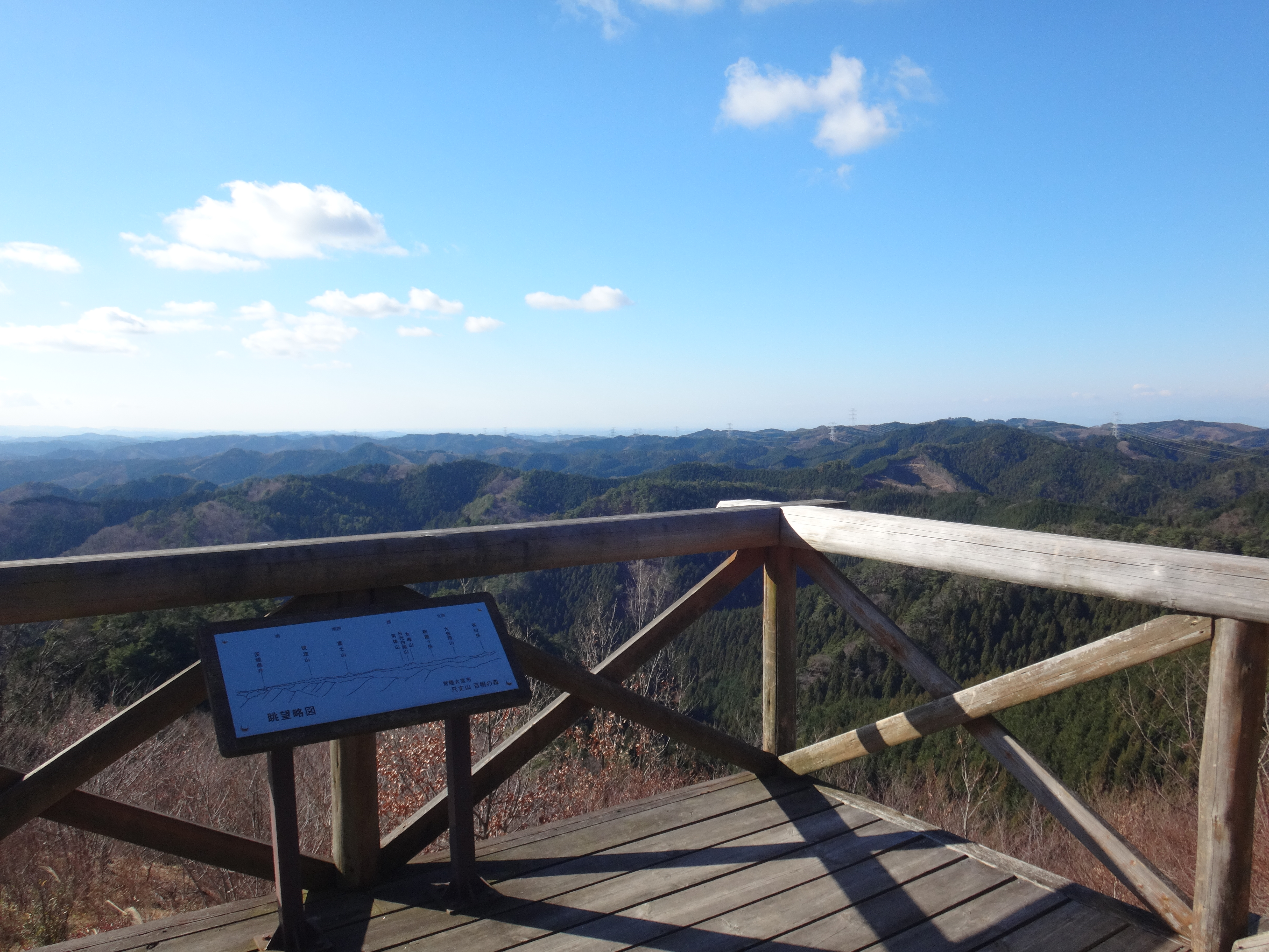 尺丈山直下の小屋からの展望